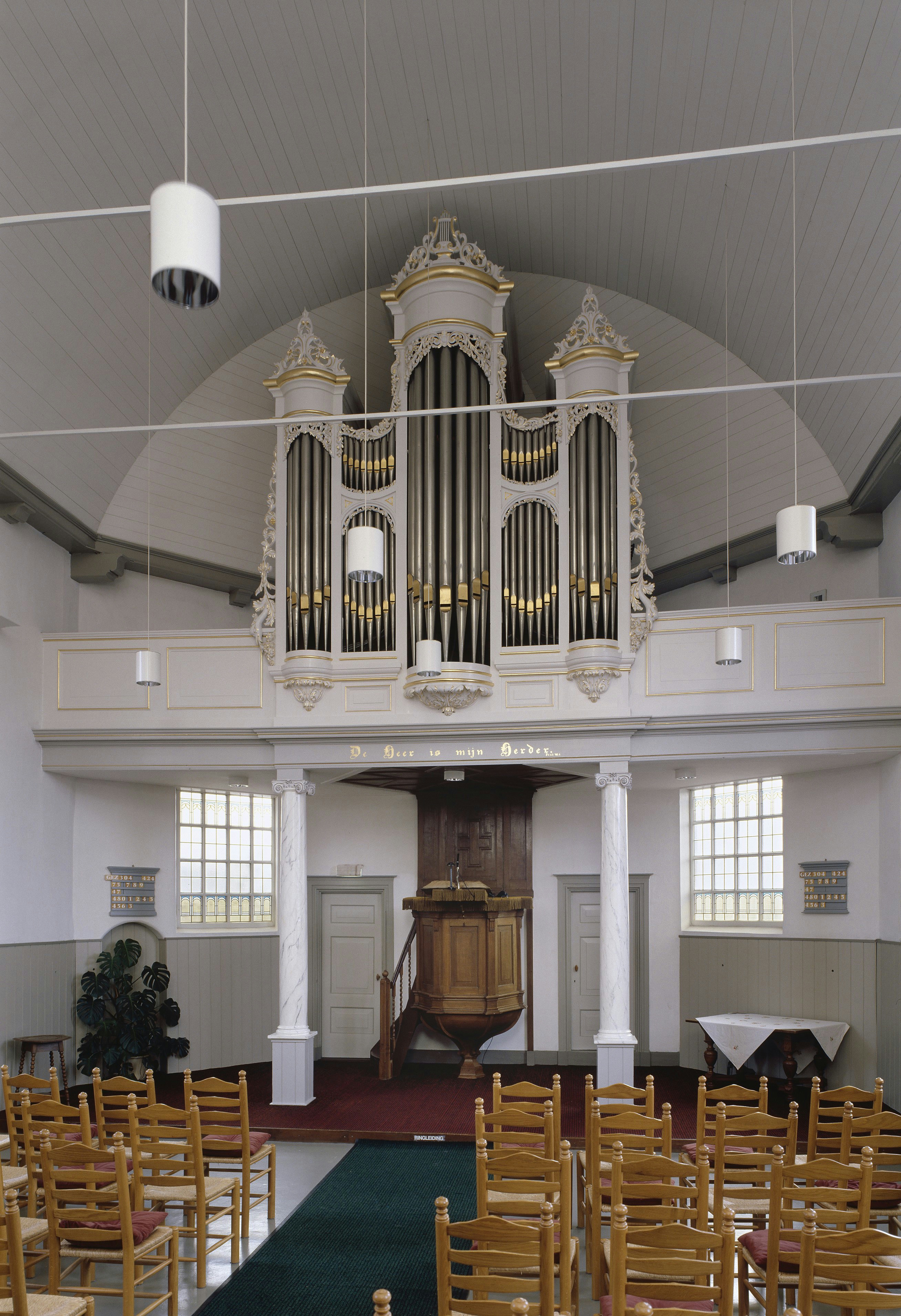 Doopsgezinde Kerk: Intenieur, aanzich goed, orgelnummer 569 (opmerking: Gefotografeerd voor Het Historische Orgel in Nederland 1872-1878, bladzijde 51)